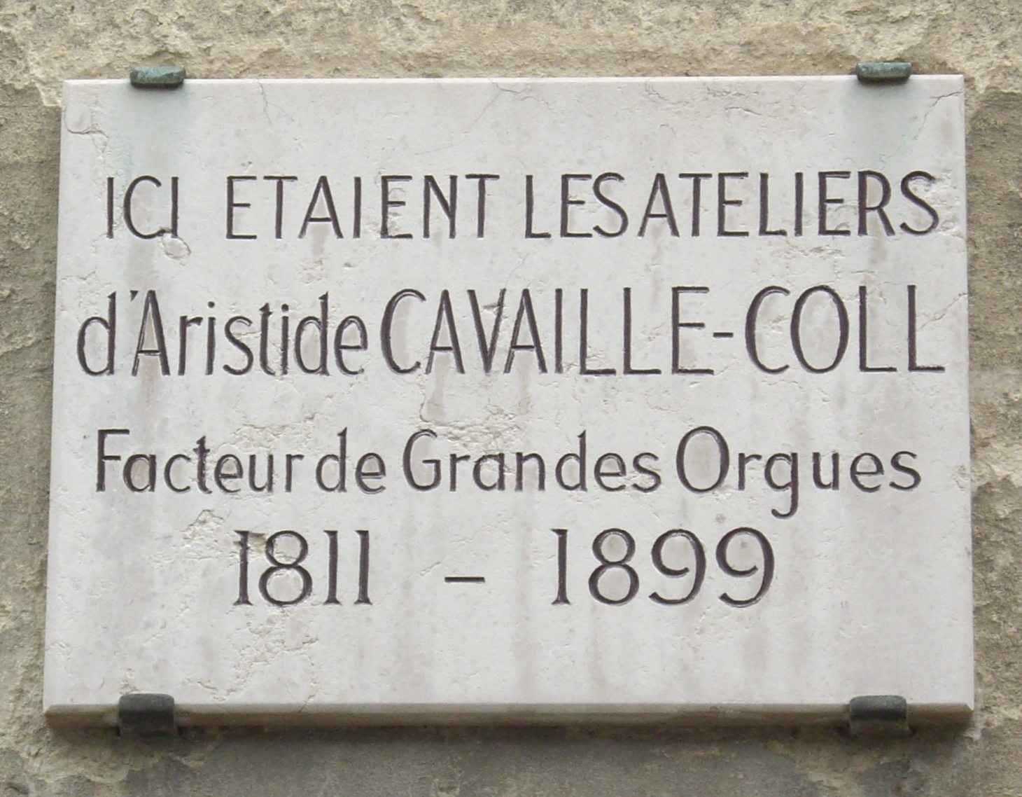 Plaque commémorative, 13 avenue du Maine, Paris 15e. « Ici étaient les ateliers d'Aristide Cavaillé-Coll, facteur de grandes orgues, 1811-1899. »